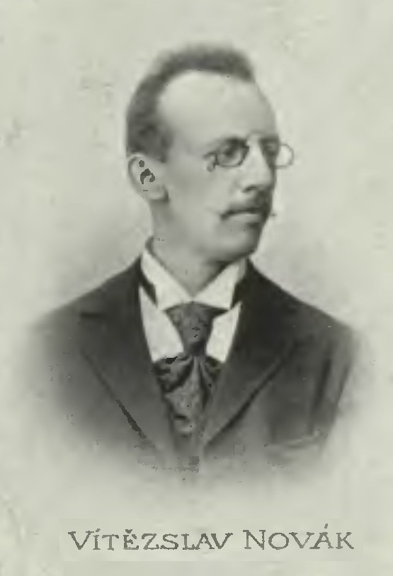 Portrét – Vítězslav Novák (1870-1949), Český hudební skladatel .